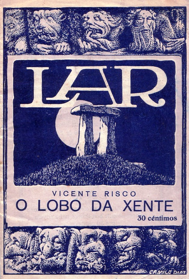 10 O lobo da xente. Vicente Risco. Lar. 1925.jpg